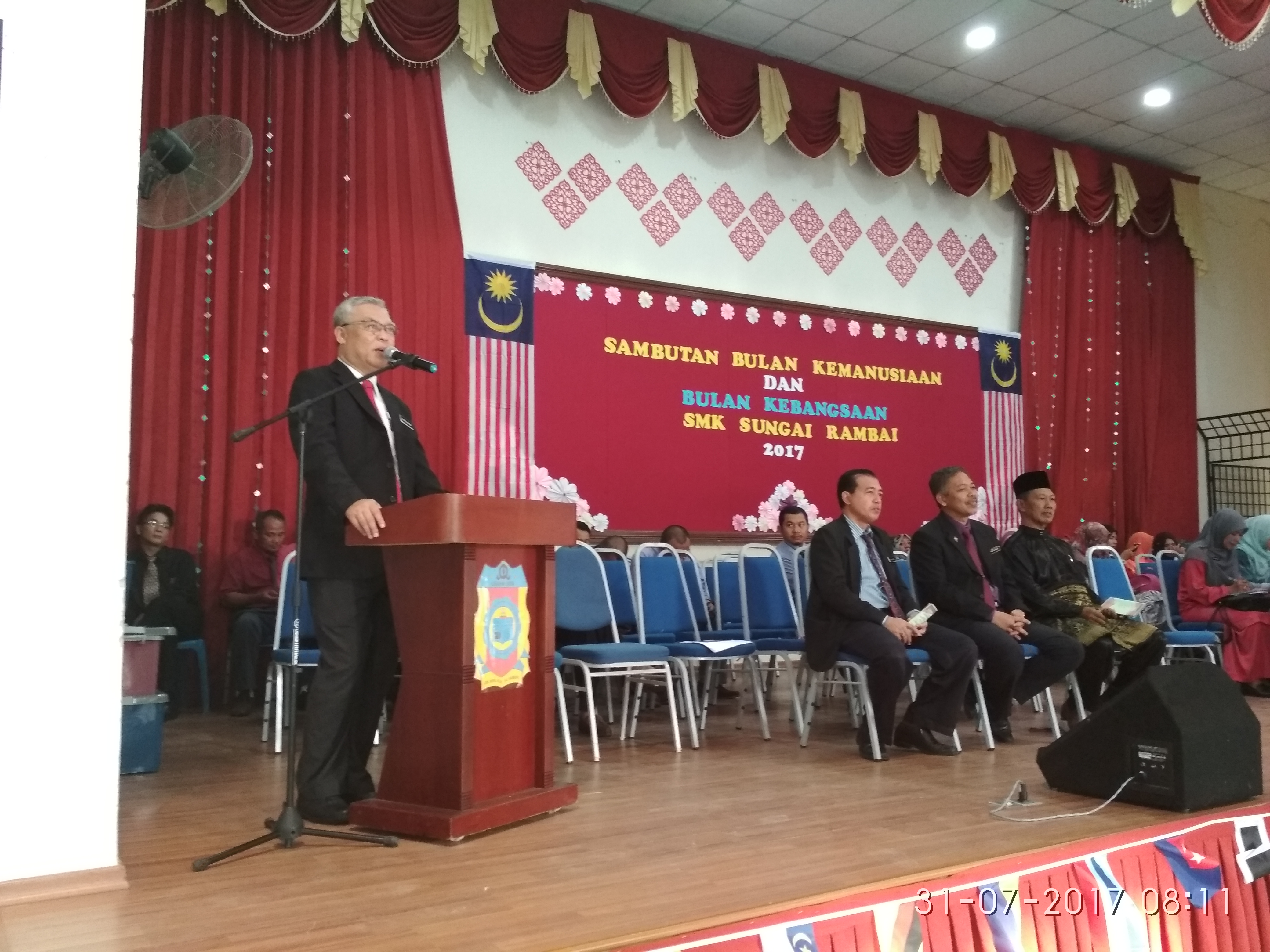 sambutan kemerdekaan 2017 pengtua smksr